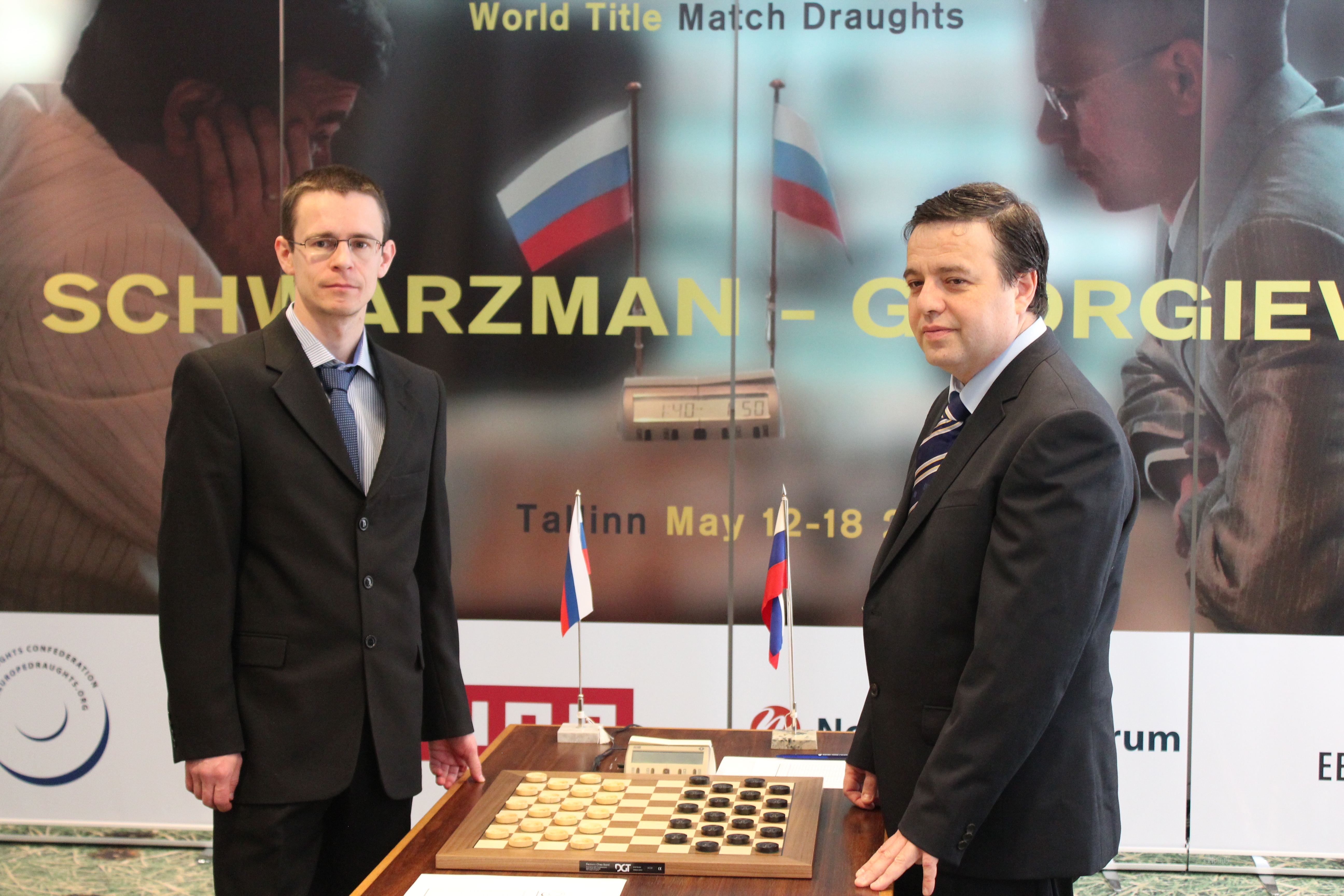 Alexander Georgiev ja Alexander Schwarzman mm-matši avamisel Tallinnas